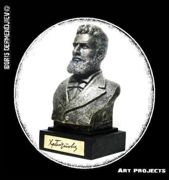 Христо Ботев. Бюст. Скулптура от Борис Дерменджиев.